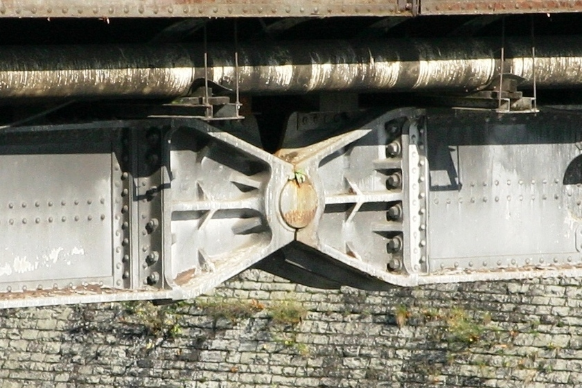 Pont de Fetinne Detail vum Schlass.